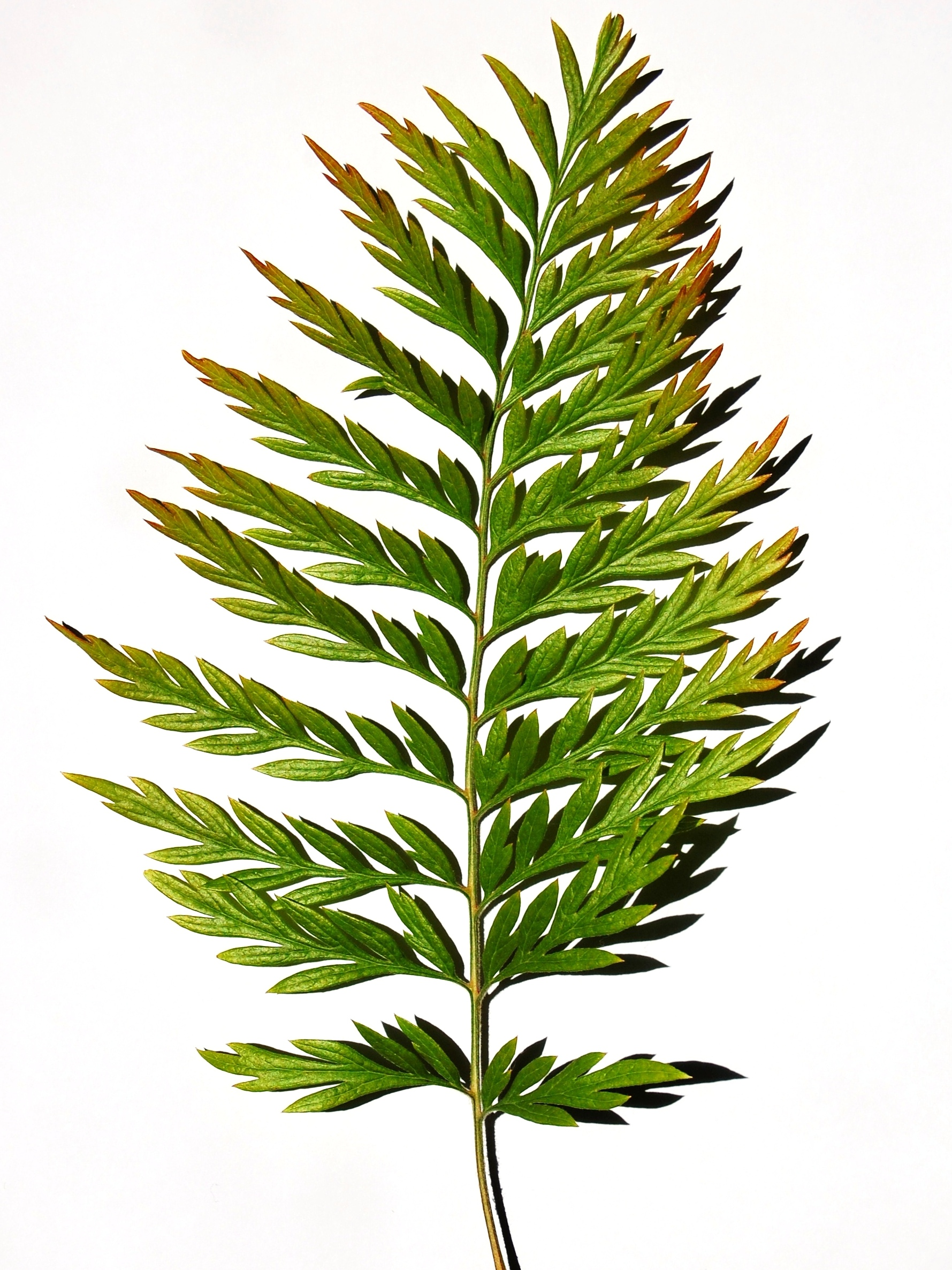 Grevillea robusta